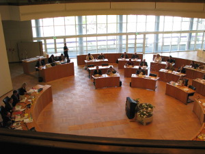 Mannheimer Gemeinderat im Stadthaus.